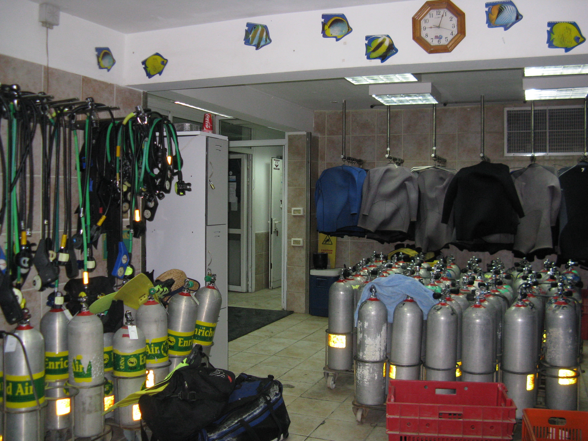 מאחורי הקלעים של דלפק במועדון צלילה באילת